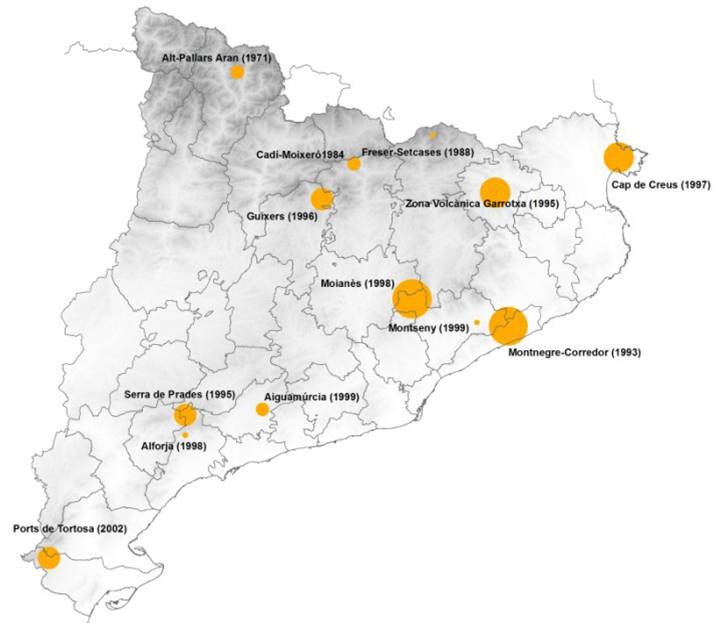 Mapa de les re-introduccions de cabirol a Catalunya.